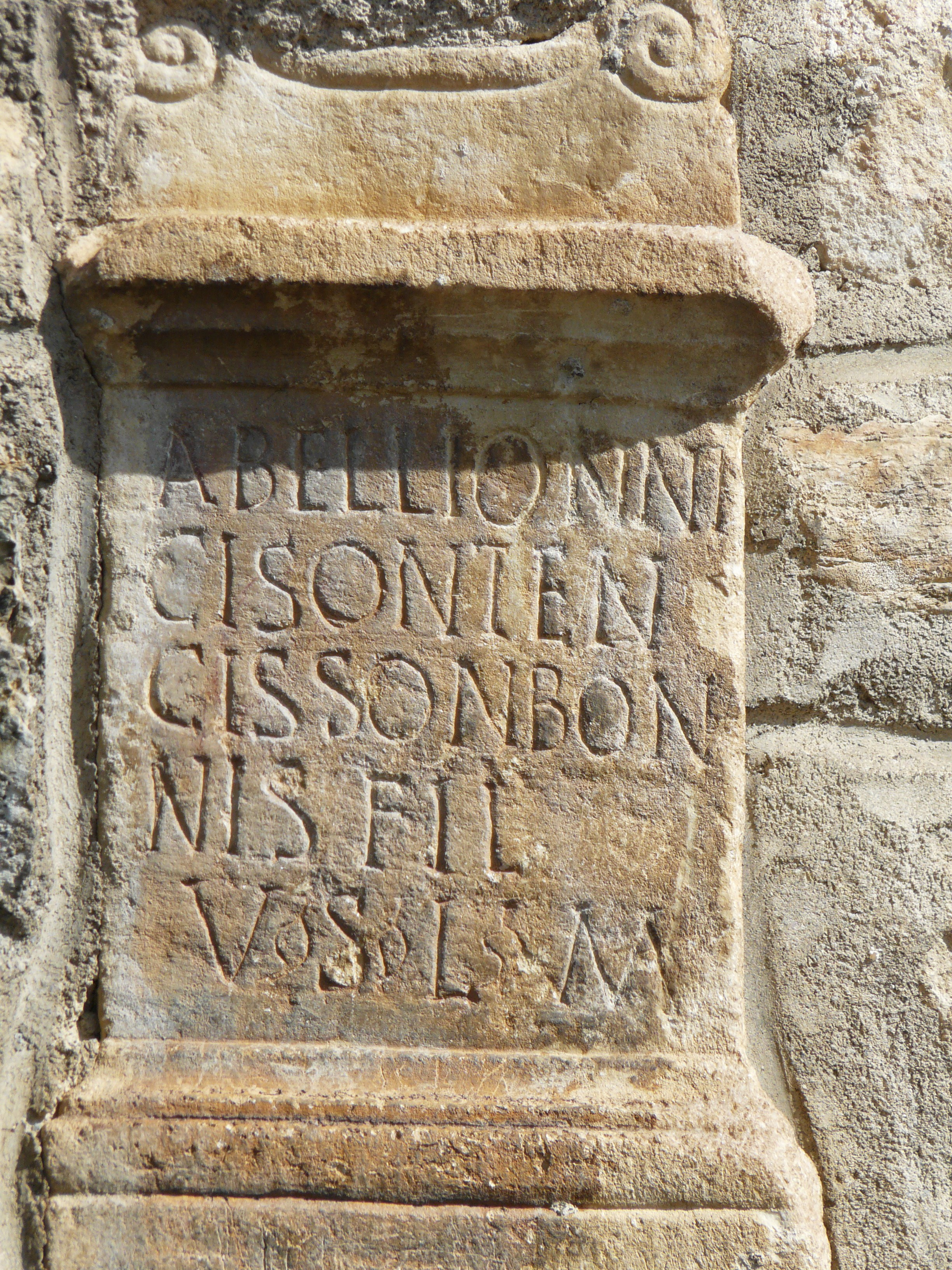 Autel votif gallo-romain dédié au dieu Abellio (Ier au IVème siècle). Utilisé en remploi dans la maçonnerie de l'église de Saint-Aventin (Haute-Garonne, France). L'inscription "Abellionni / Cisonten / Cissonbon/nis fil(ius) / v(otum) s(olvit) l(ibens) m(erito)" ("A Abellion, Cisonten, fils de Cissonbon, s'est acquitté de son vœu de bon gré comme il se doit.") est mentionnée dans le CIL XIII sous le n° 337.